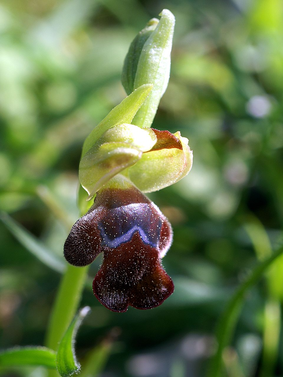 Ophrys omegaifera - flower